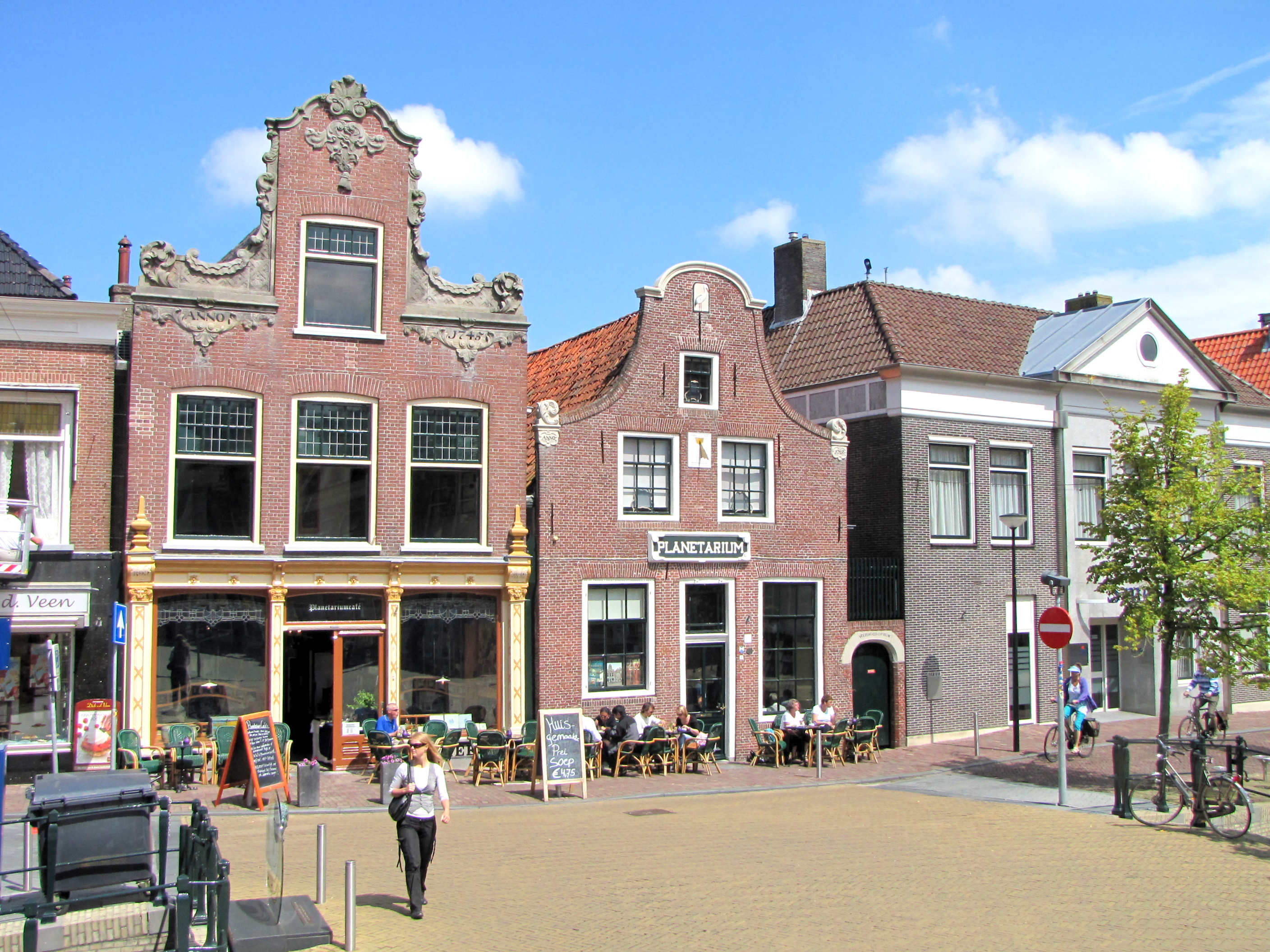 Franeker Planetarium (Mitte).